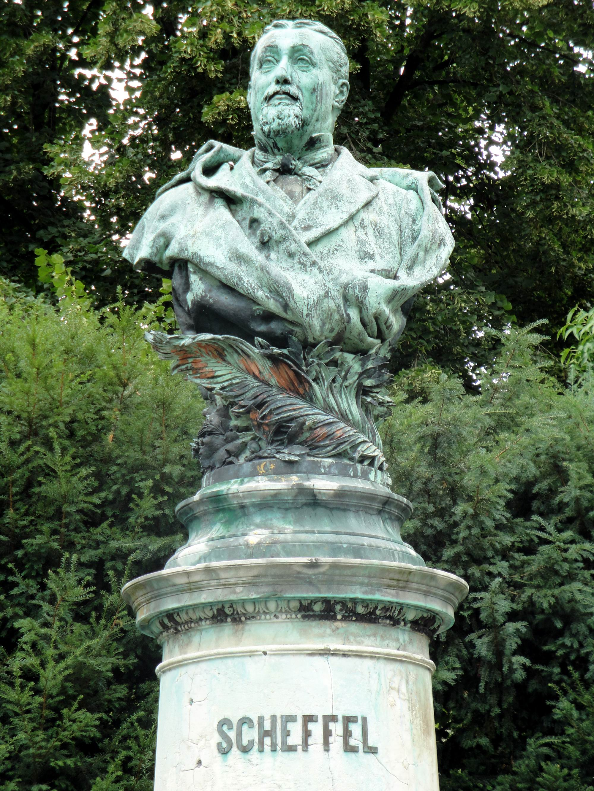 Karlsruhe Innenstadt-West